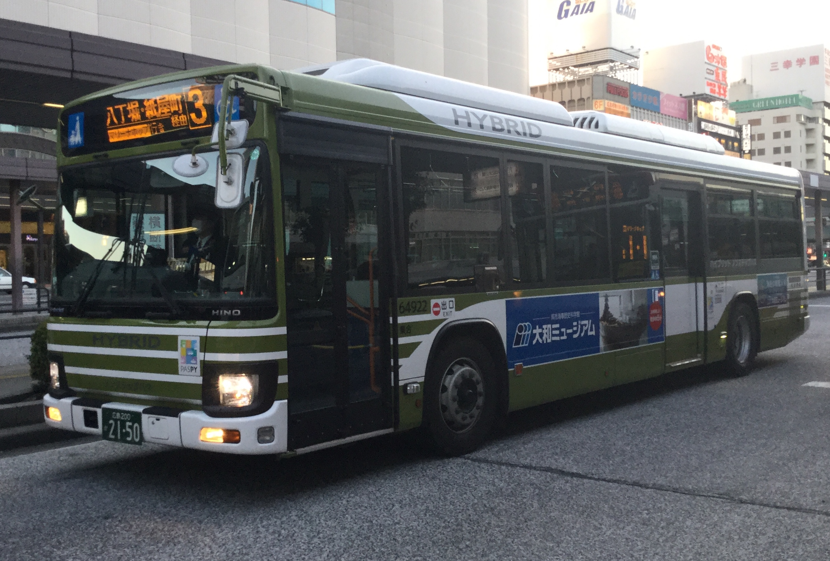 広電バス ブルーリボンハイブリッド